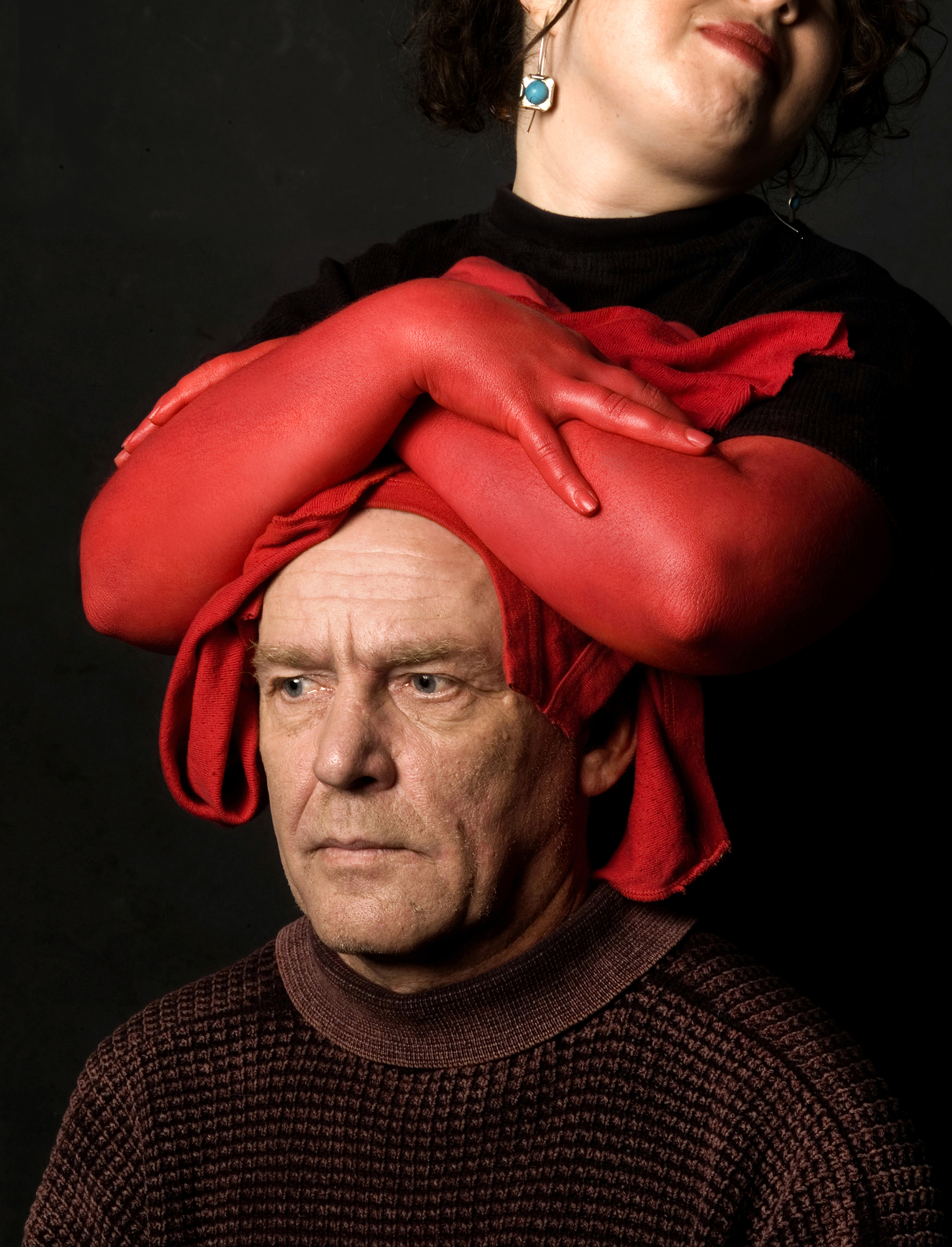 Руслан Вашкевич. «Портрет мужчины в красном тюрбане». 2008